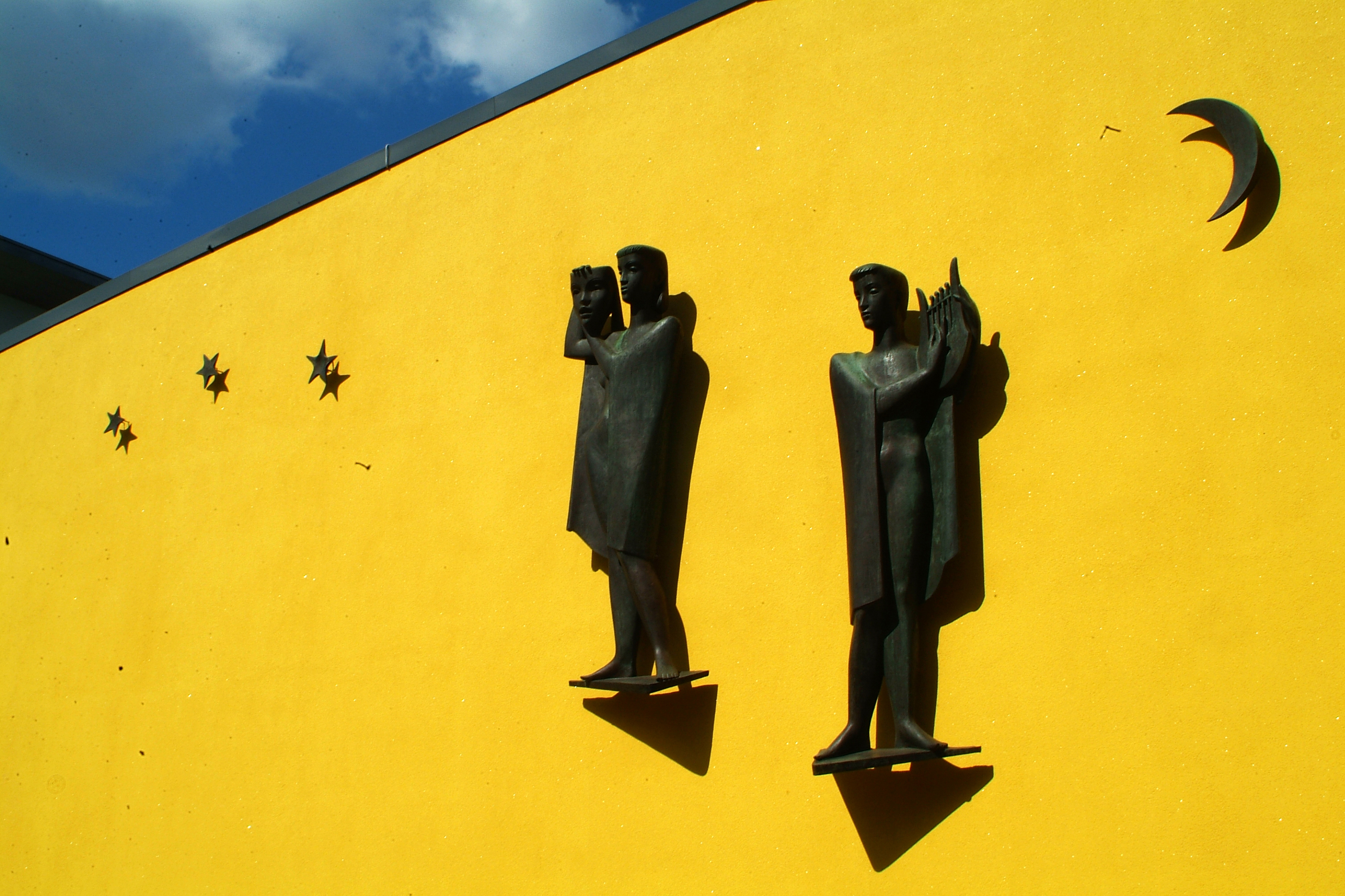 Die Skulpturengruppe "Schauspiel und Musik" von Hermann Scheuernstuhl von 1955 wurde an der Aula der Leibnizschule in Hannover, Röntgenstraße 8 installiert.